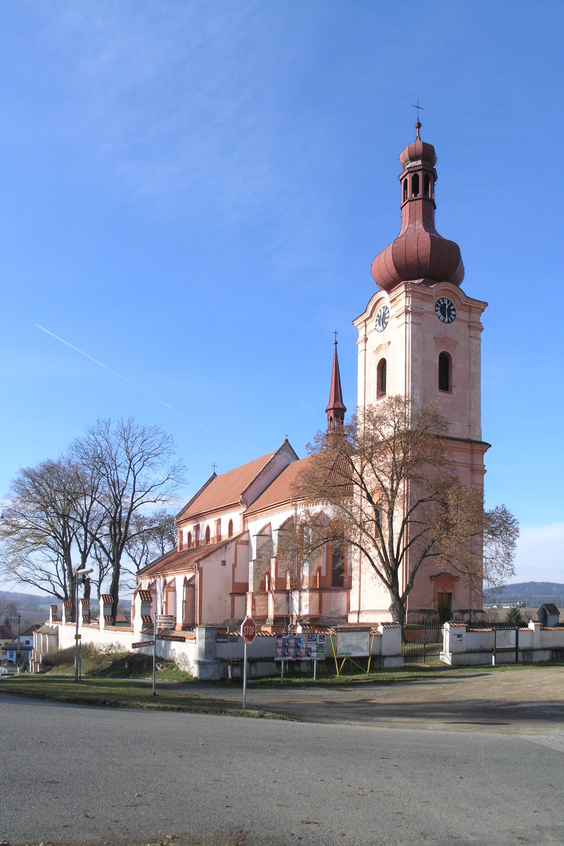 Nepomuk